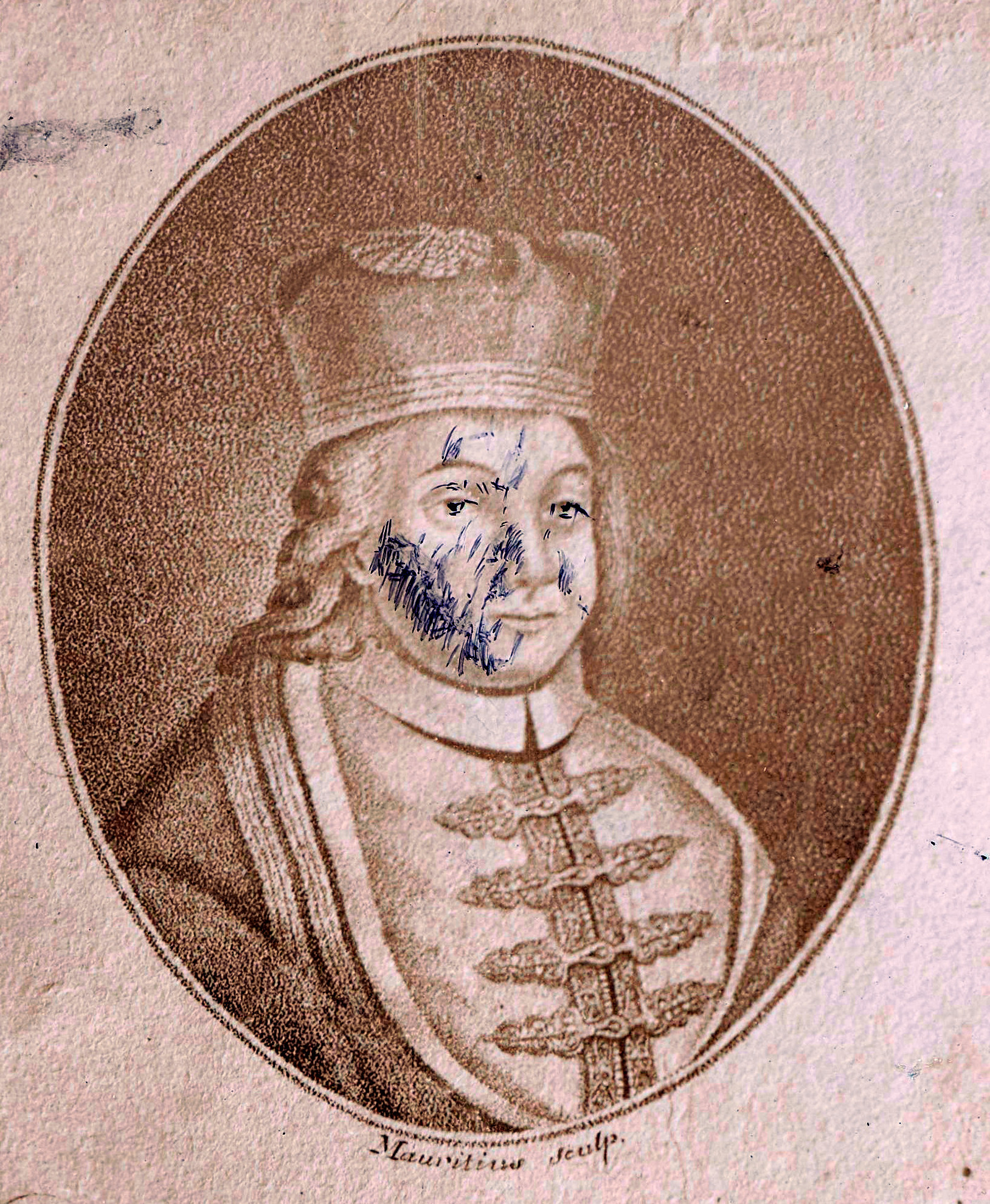 Wilhelm Kaliński, fot. ryciny St. Pczyckiego